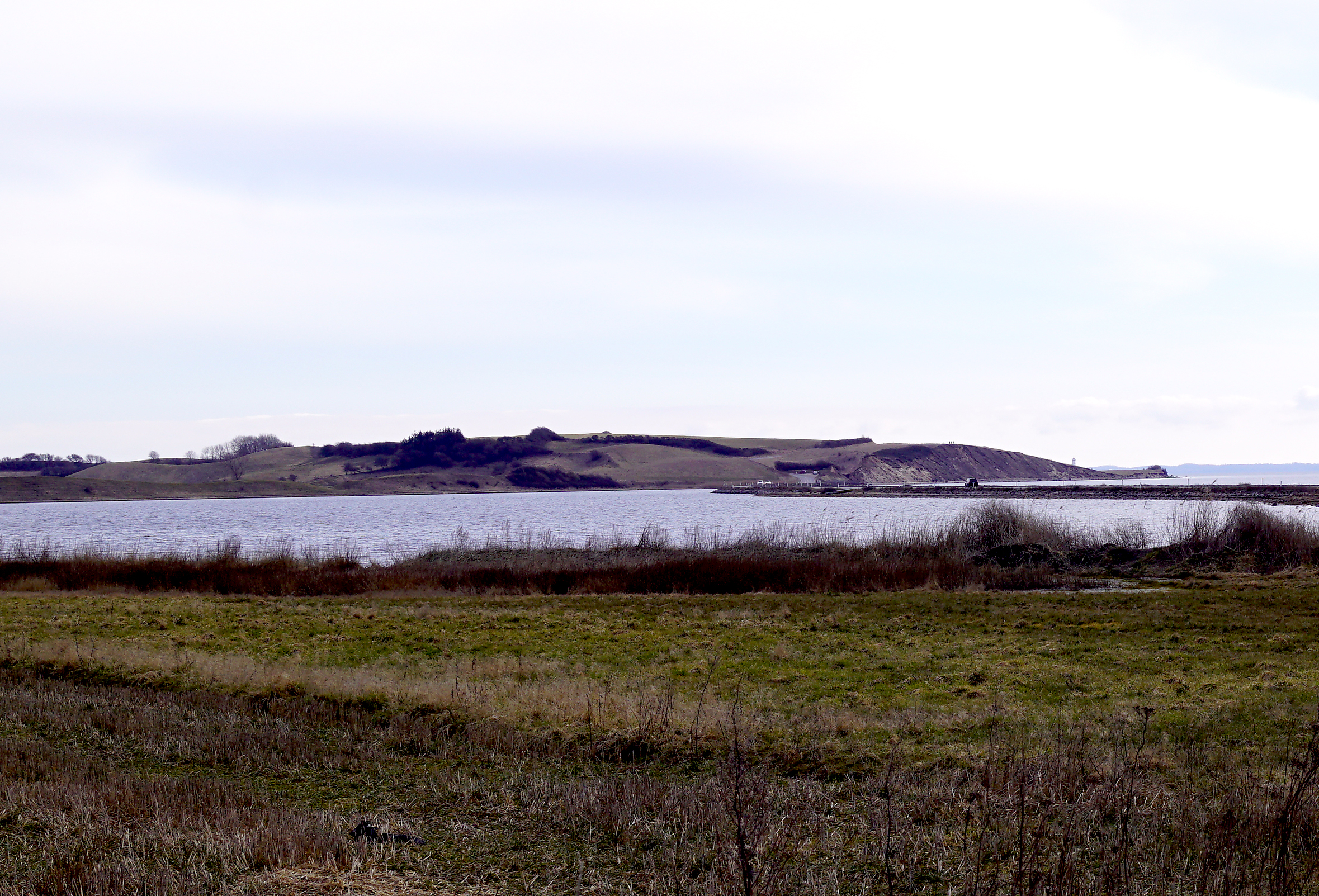 Bobakkerne på Helnæs set fra fra Nord